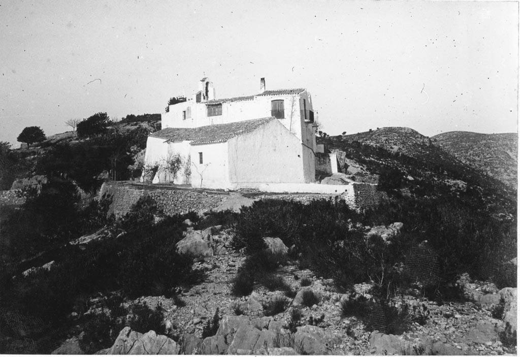 Ermita i casa de la Trinitat sobre un turó de Vallcarca. Juli Vintró i Casallachs (Entre 1890 i 1911)